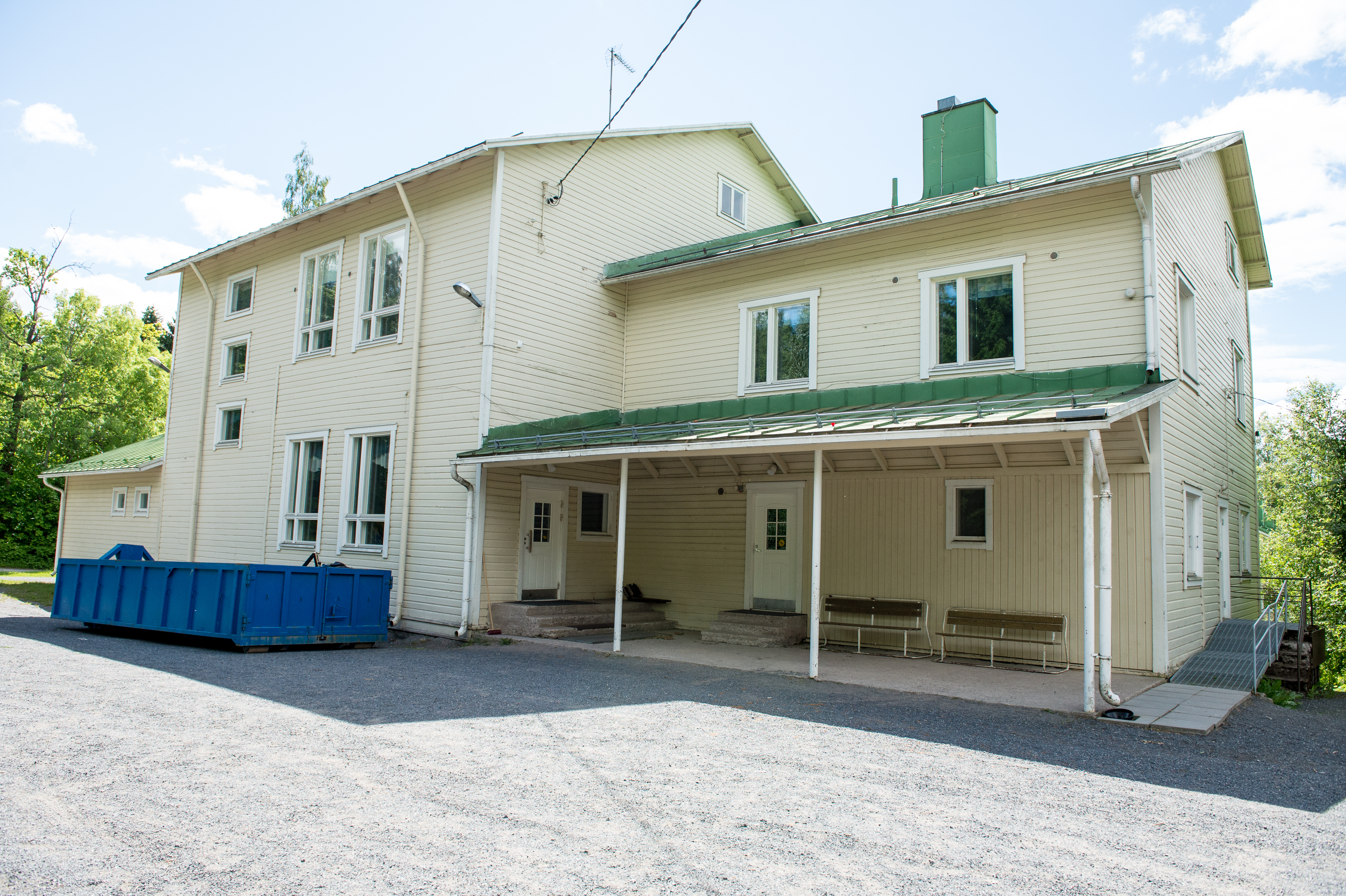 Ollilan koulu